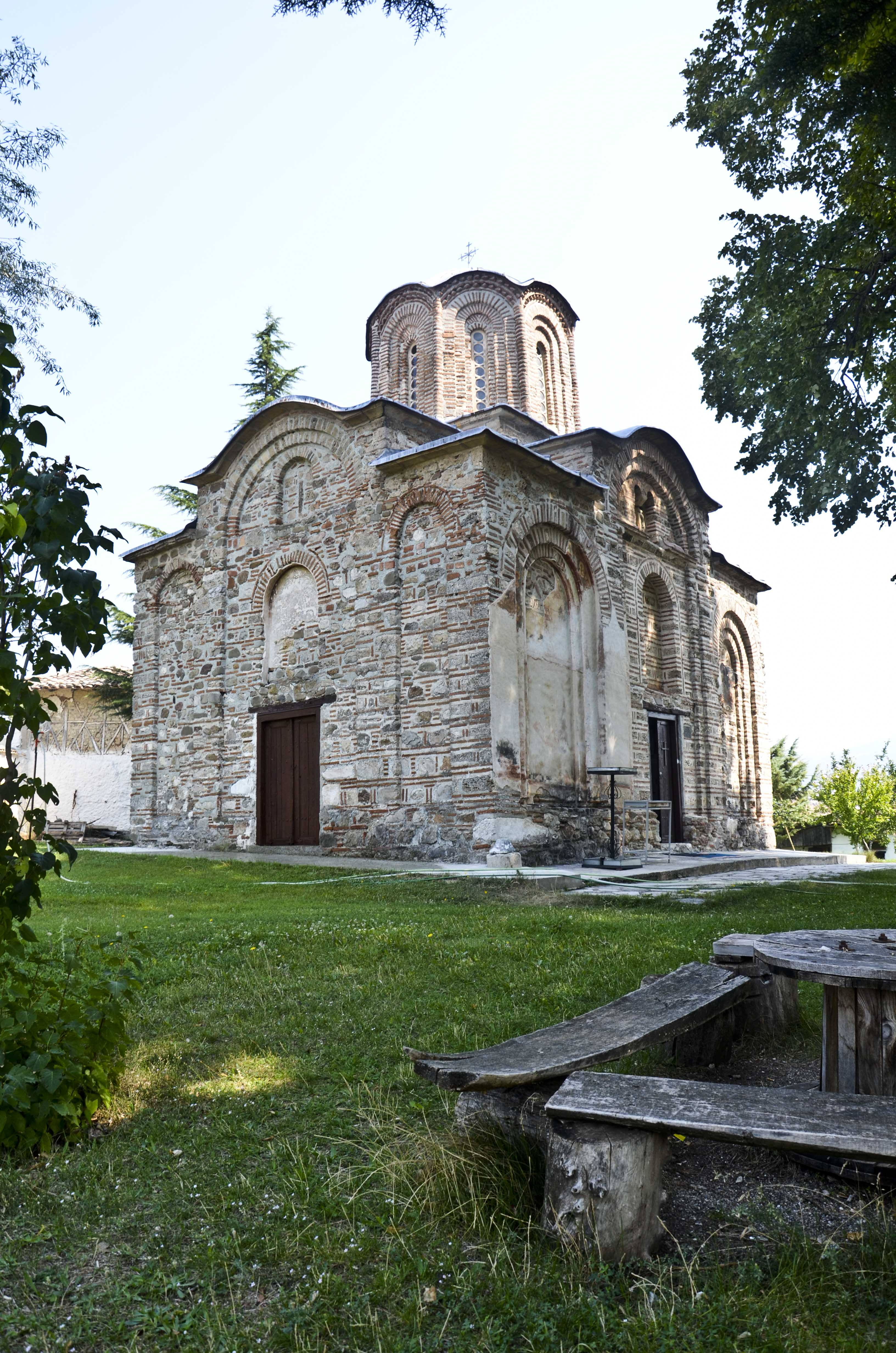 Црква Свети Никита, село Бањани, скопско